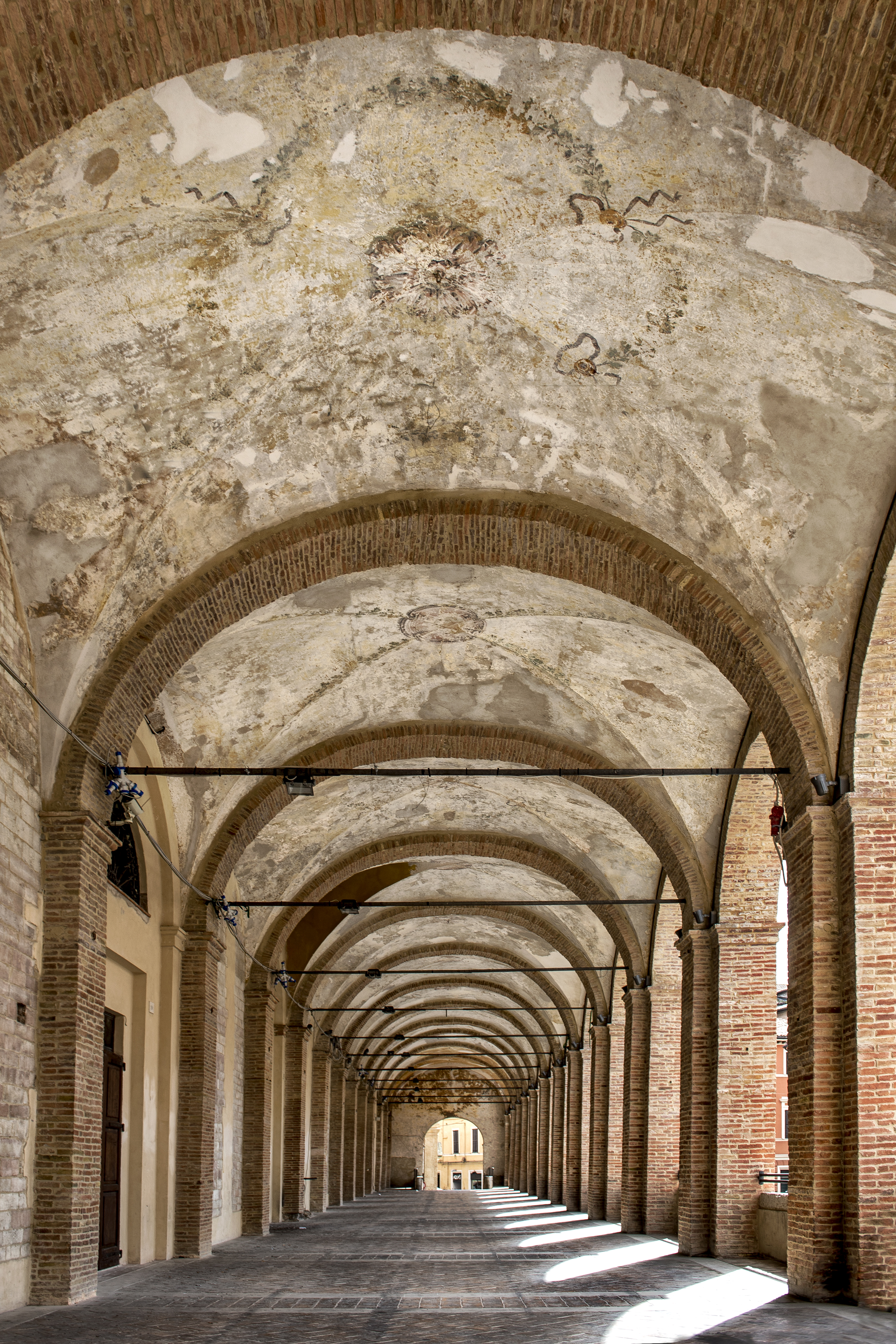 Loggiato San Francesco This is a photo of a monument which is part of cultural heritage of Italy.